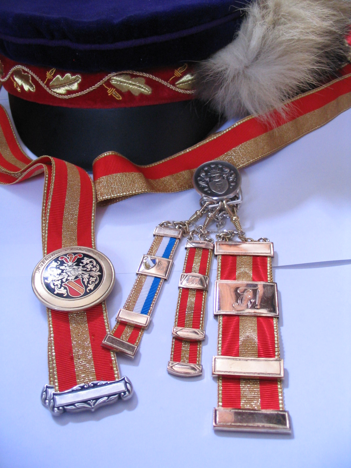 Couleur der Burschenschaft Teutonia Nürnberg. Fuxenband, Burschenband, Zipfelbund, Mütze (mit Fuchsschwanz als äußeres Zeichen für den Fuxmajor)